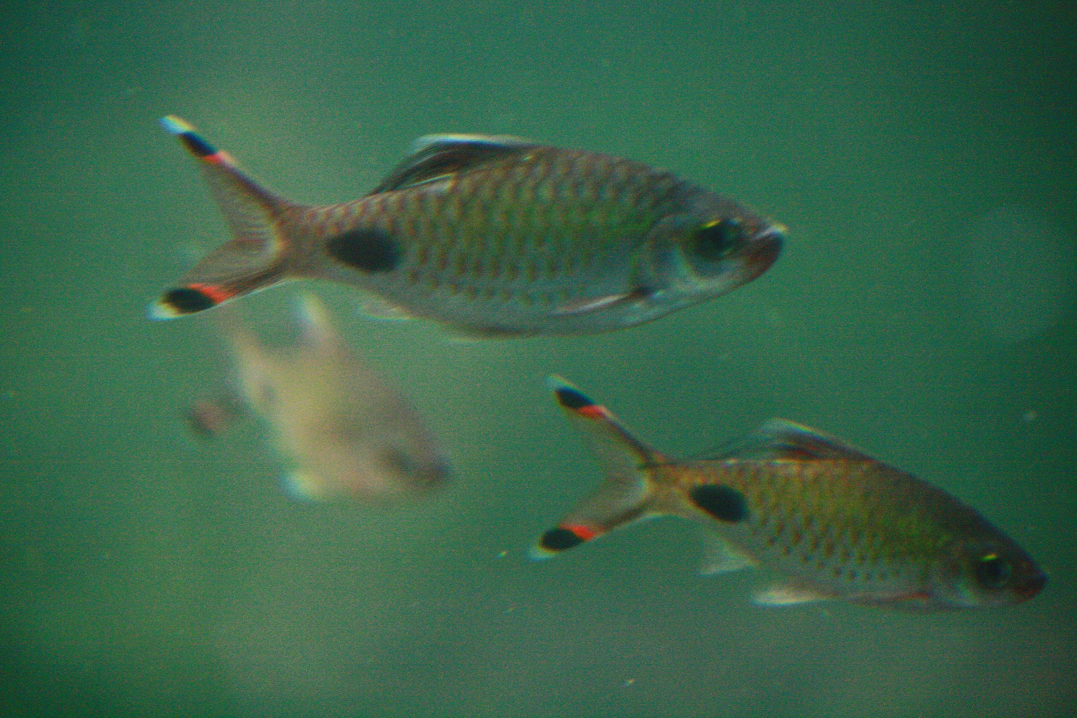 Zoo Praha